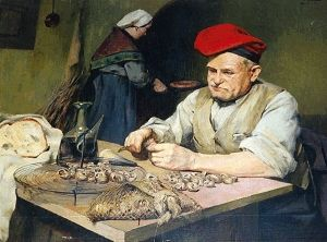 cargolade